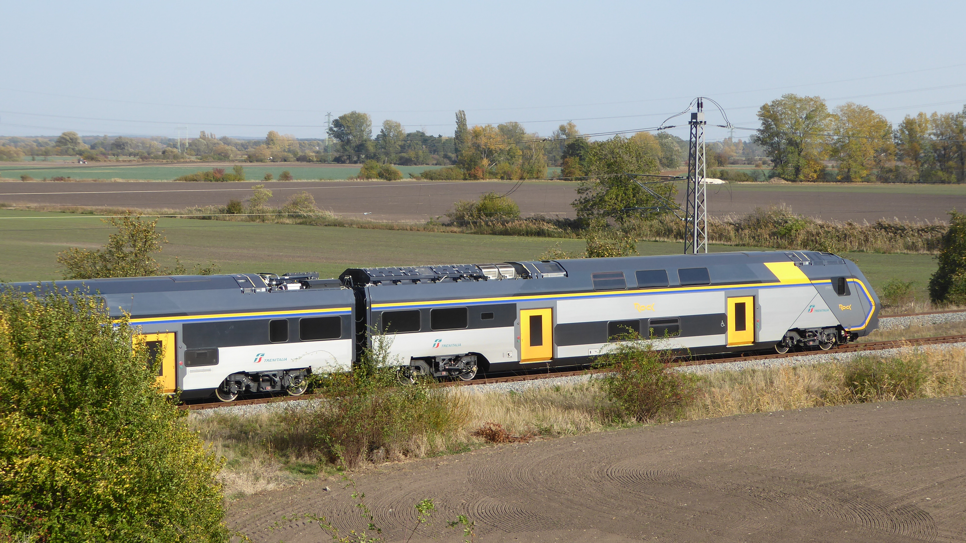 Trenitalia Hitachi Caravaggio auf dem Eisenbahnversuchsring Velim (CZ)